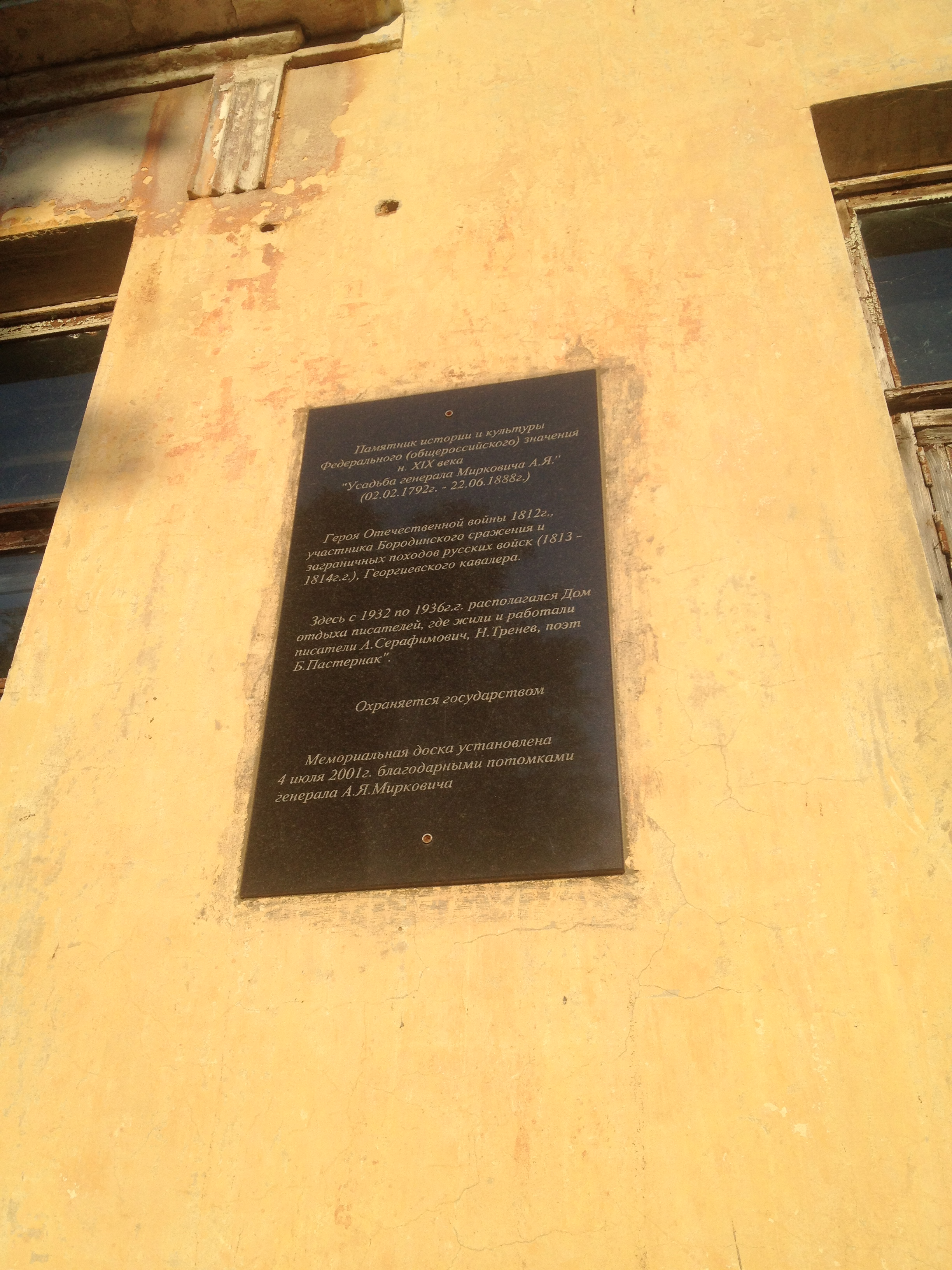 Усадьба Мирковича А. Я. (Тульская область, Суворов, село Николо-Жупань)